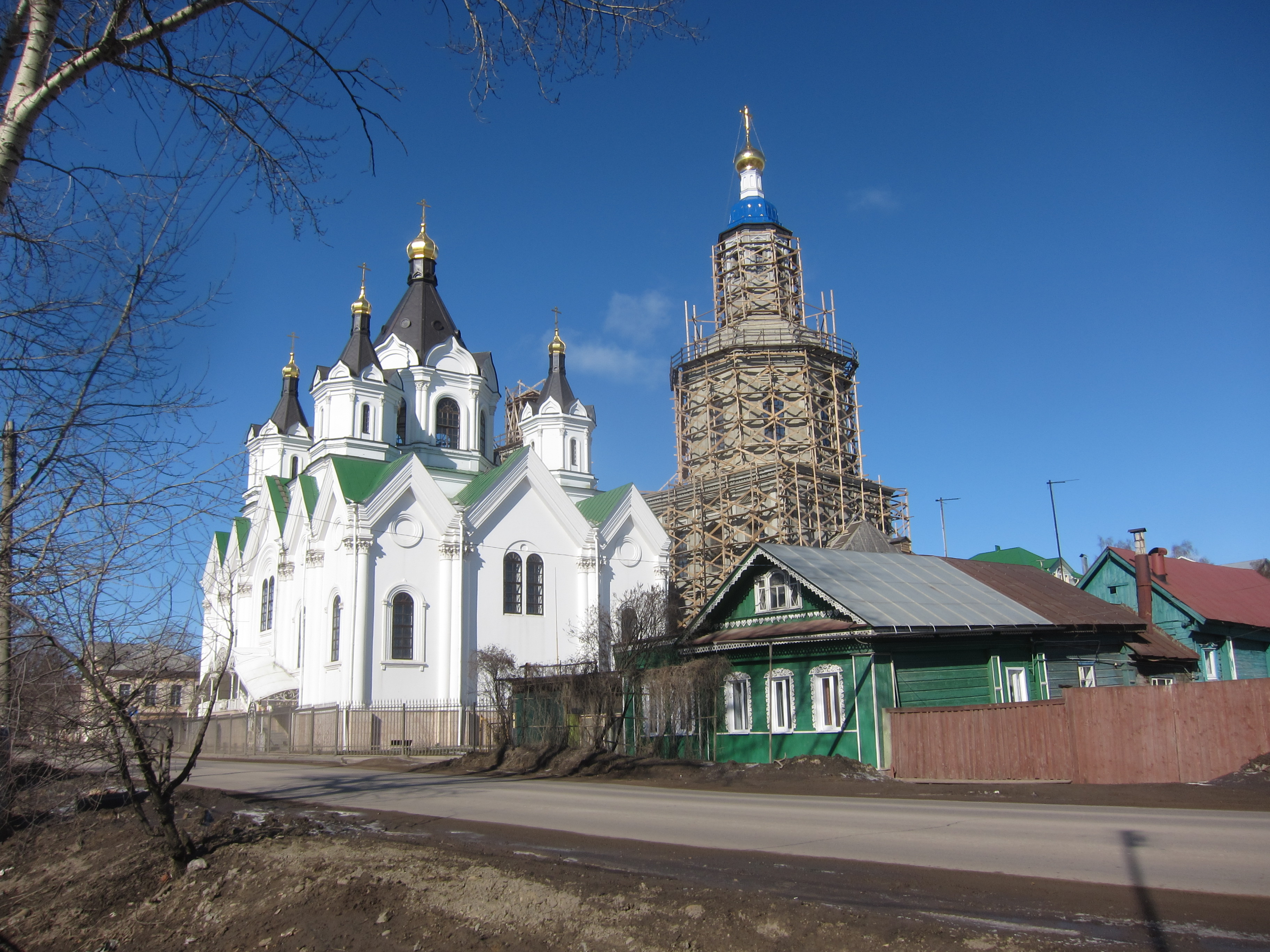 Lenina rue